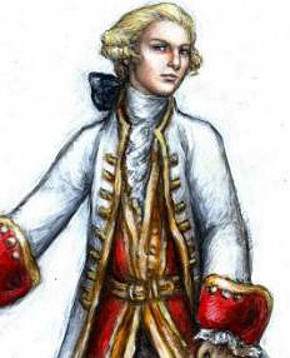 Dessin imaginaire du marquis de Sade